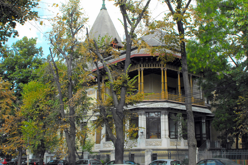 Polona 4